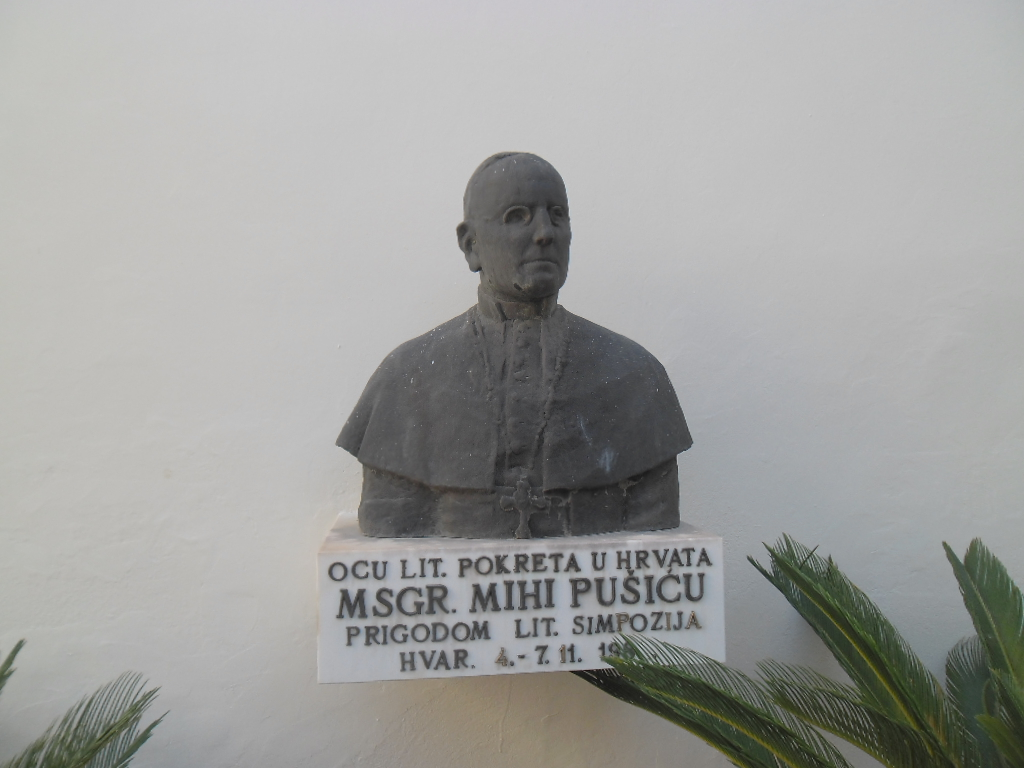 grad Hvar